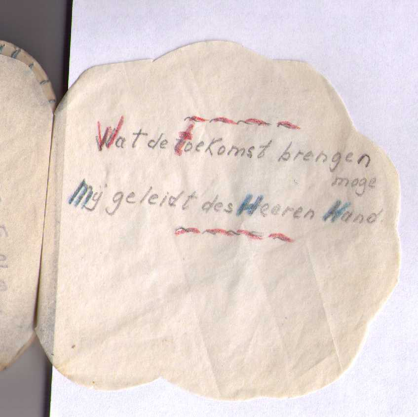 Souvenir van mevrouw van Ommen, lid van het Agfacommando van Dachau, pagina 2